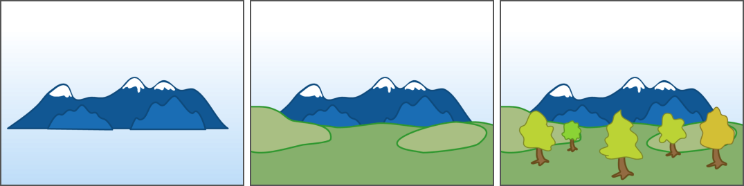 Se pintan primero las montañas lejanas, seguidas por el prado; finalmente se dibujan los objetos más cercanos, los árboles. Painter's algorithm: objects are drawn in order by their distance to the viewer, starting with the farthest ones. By Fredrik. Vector drawing source file available. Source: English Wikipedia, original upload see file history